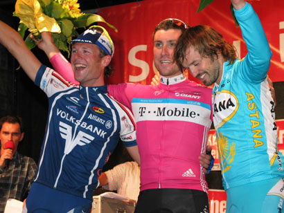 Christian Pömer, Bernhard Eisel, Rene Haselbacher